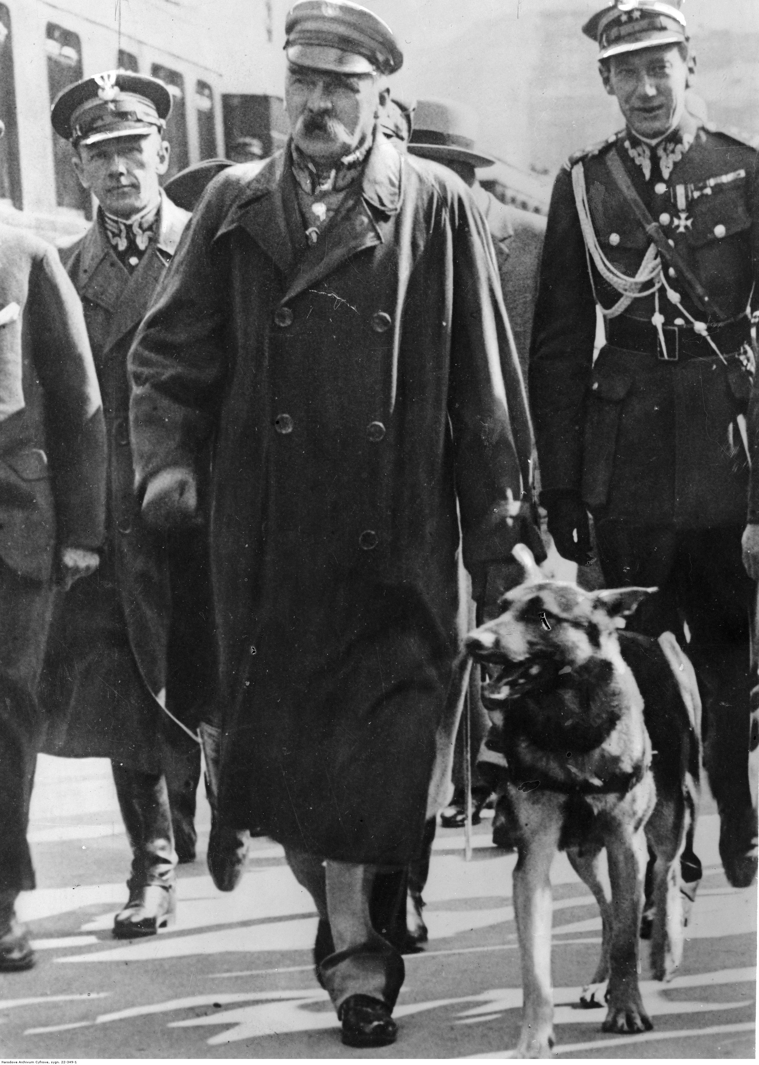 Marszałek Józef Piłsudski przed wyjazdem do Rumunii w towarzystwie adiutanta mjr. Konrada Zembrzuskiego (1. z lewej), płk. Józefa Becka (1. z prawej) i psa "Psa"